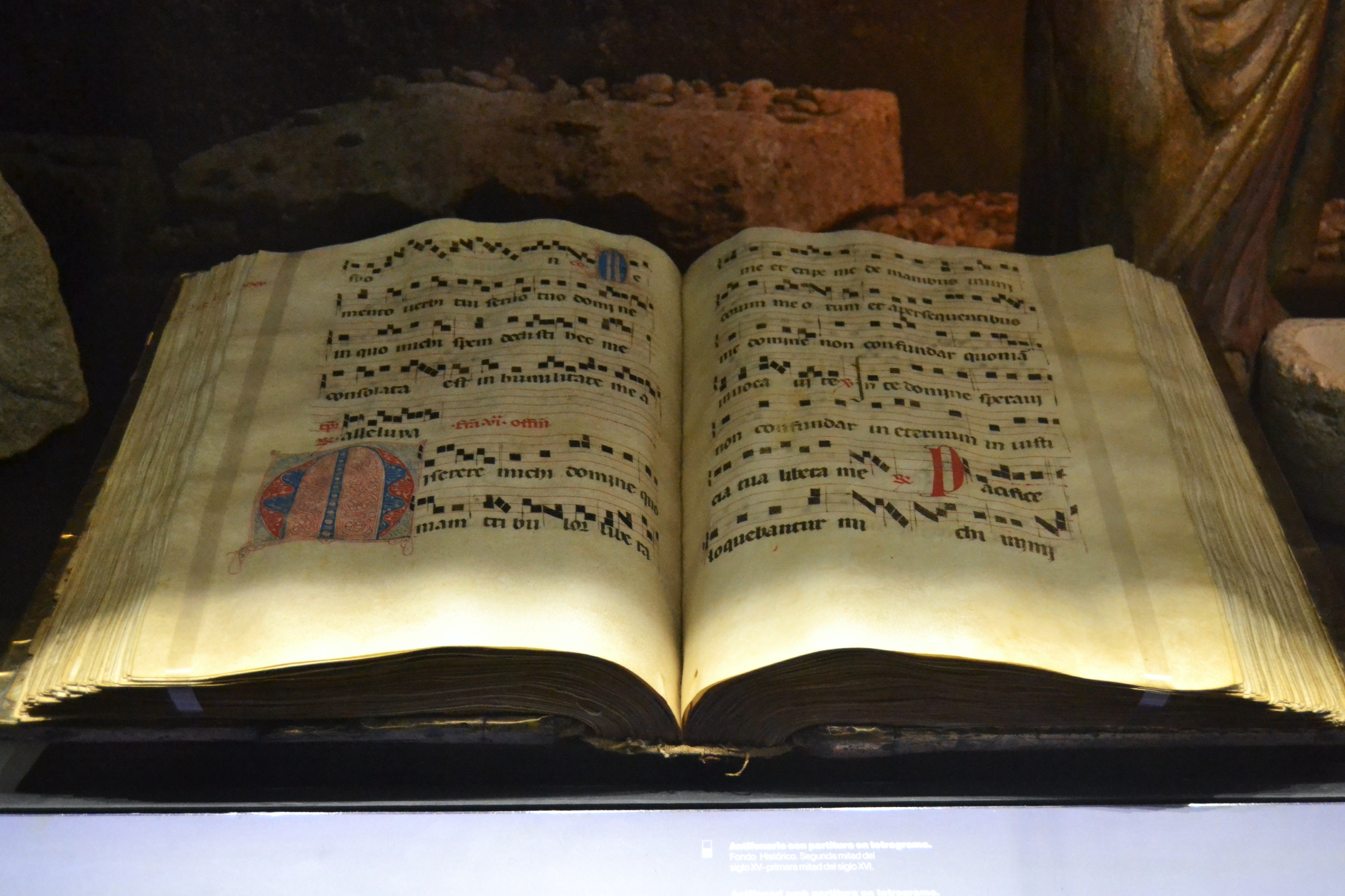 Antifonari amb partitura en tetragrama. Fons històric, segona meitat del segle XV - primera meitat del segle XVI. Museu arqueològic d'Alacant (MARQ).